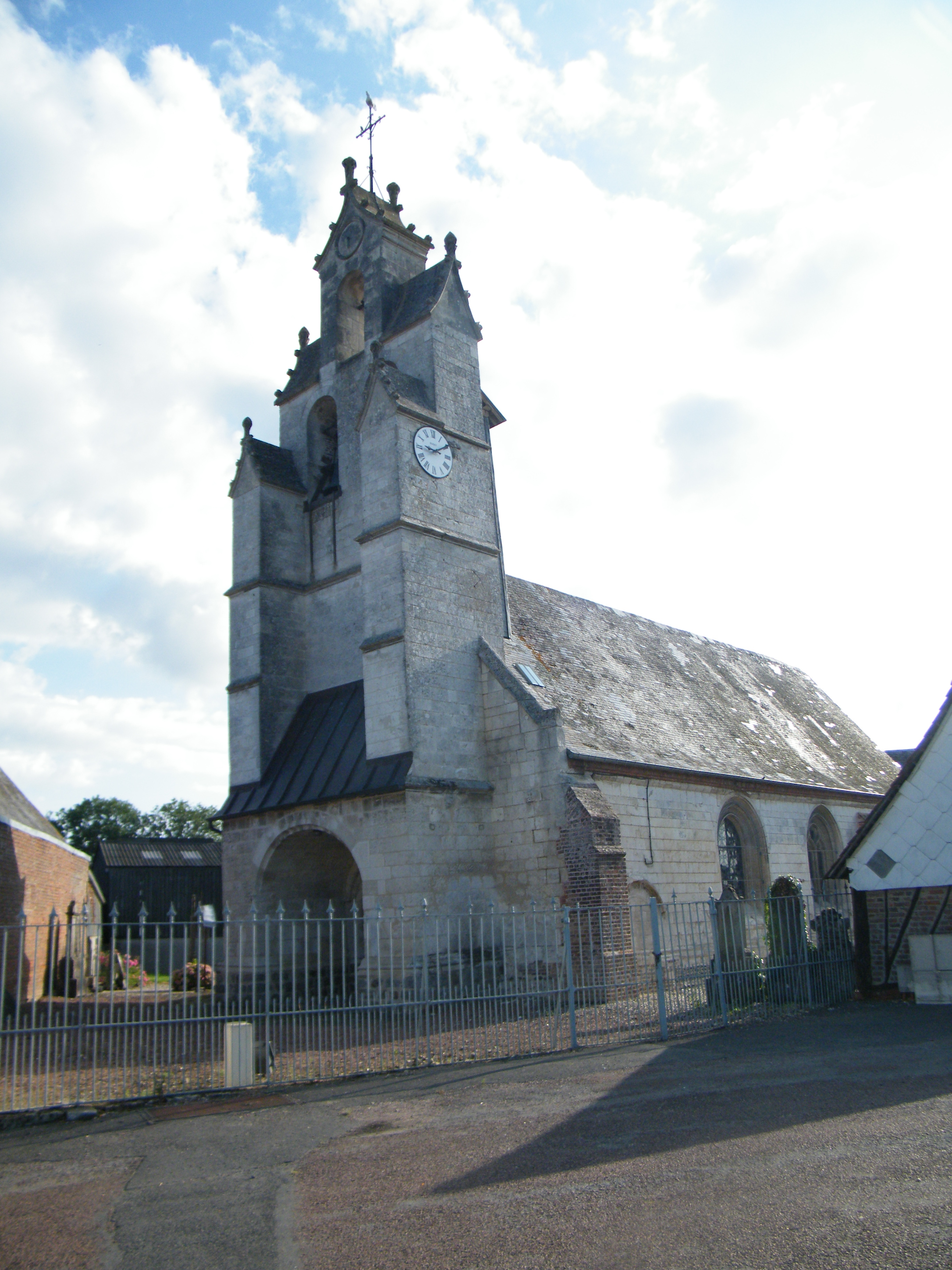 L'église Saint-Gervais d'Aumont (Somme).